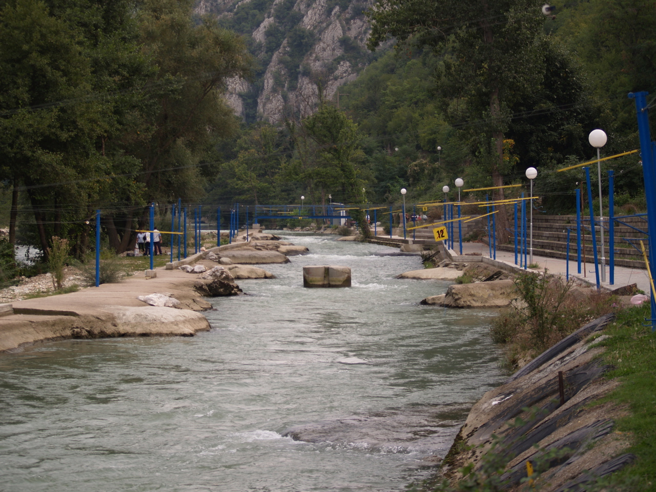 Treska Rive near Skopje